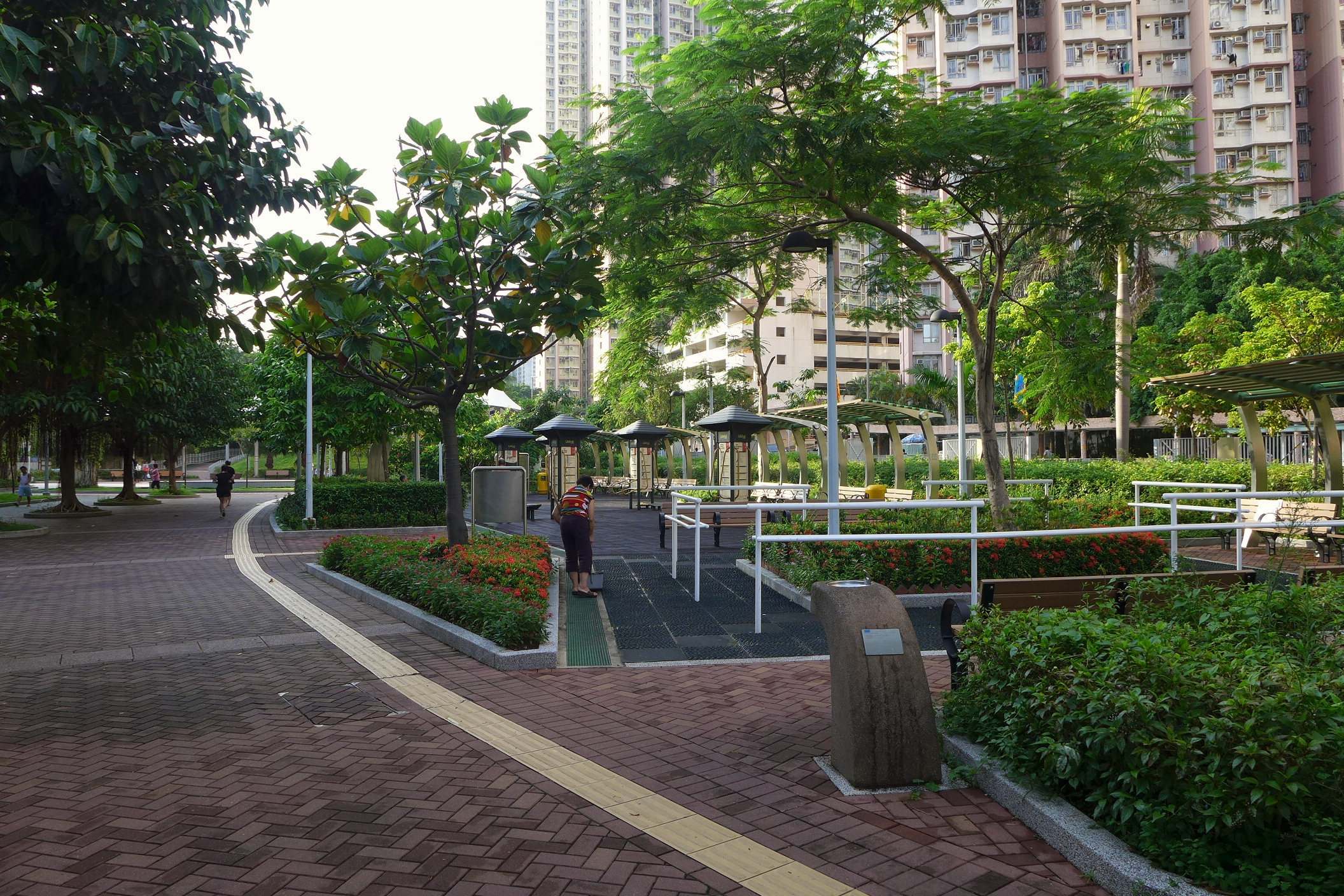 Sau Ming Road Park Fitness Zone